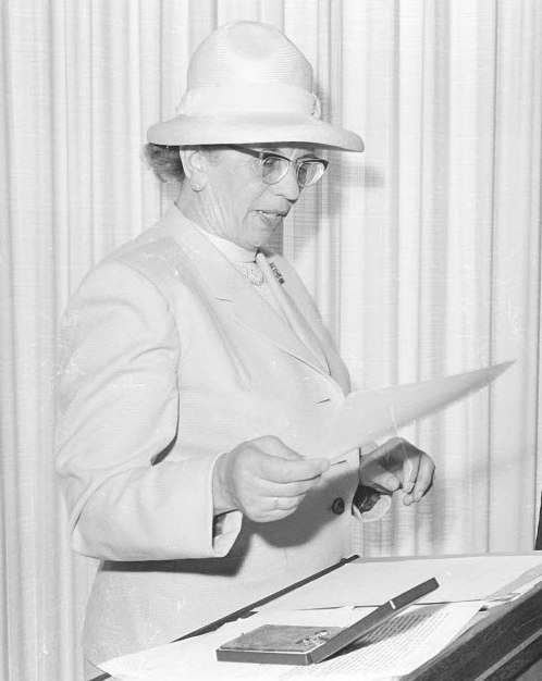 Landessozialministerin Lena Ohnesorge (links) übergibt im Sitzungssaal des Landesarbeitsgerichts die Urkunde an den Werkmeister Wilhelm Vorderberg (rechts), der seit mehr als 15 Jahren als Arbeitsrichter tätig ist.